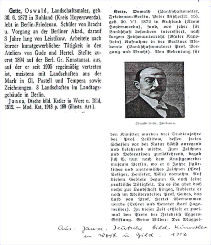 Fachbuchtext über Oswald Gette